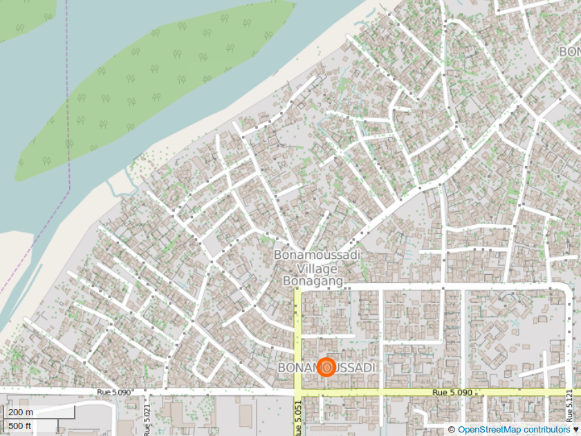 Douala, Bonamoussadi (OSM). This map may be incomplete, and may contain errors. Don't rely solely on it for navigation.